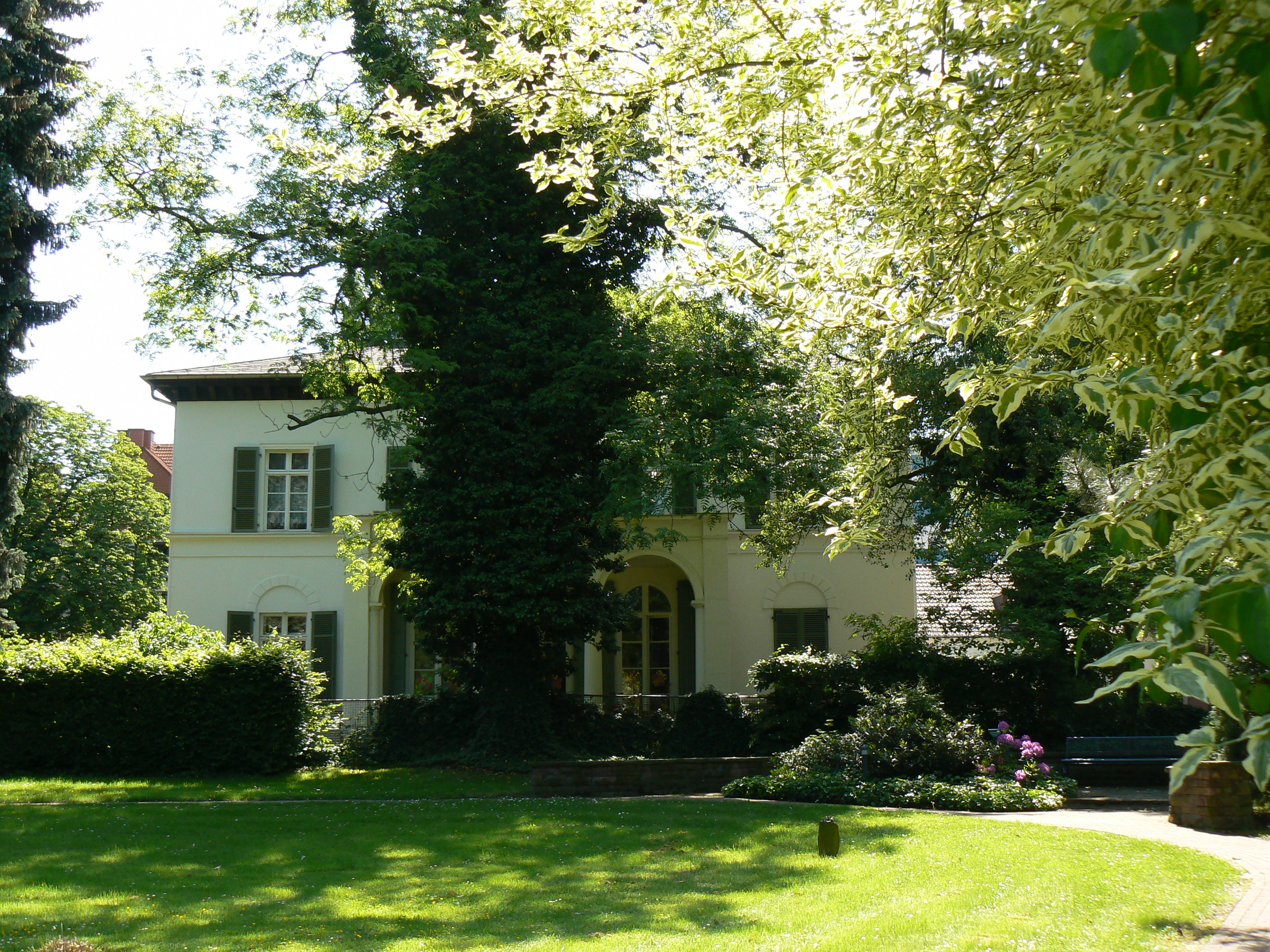 ehemaliges Landhaus Passavant, erbaut 1829 von Johann Friedrich Christian Hess (1785-1845) für Adolph Samuel Passavant (1841-1926) als Gartenvilla. Sie ist der bauliche Rest einer ehemals großen Liegenschaft mit untergegangenem Haupthaus an der Ginnheimer Straße in Bockenheim. Heute Standort des St.Elisabethenkrankenhauses und des St.Josefhauses (Altenwohnanlage). Das ehemalige Landhaus Passavant wird heute als Kindergarten ARCHE genutzt.